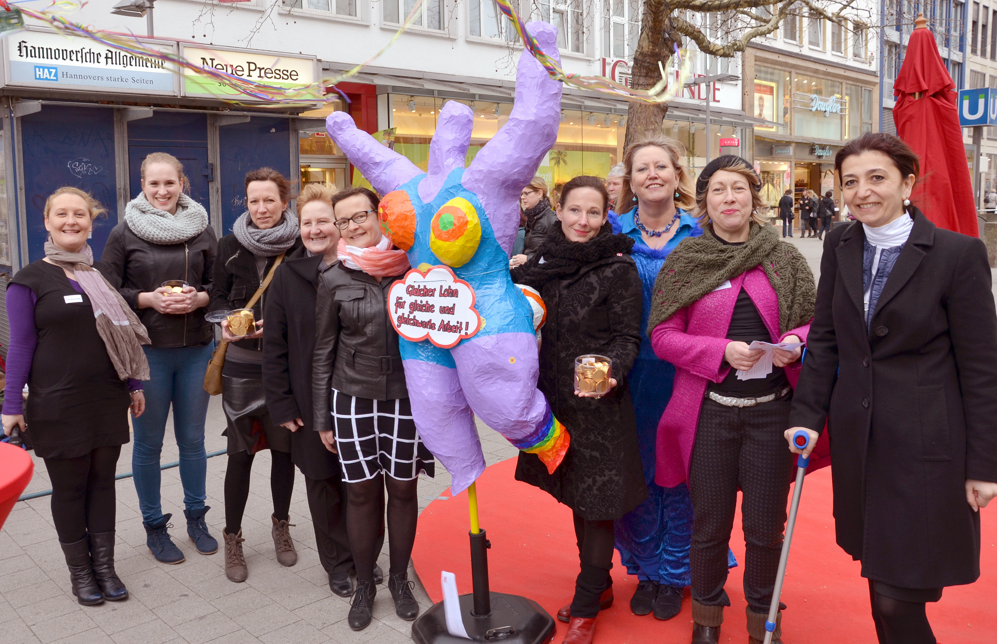 Am internationalen Aktionstag für Entgeltgleichheit zwischen Männern und Frauen, dem Equal Pay Day (EPD), war ein Bündnis auf dem Platz der Weltausstellung (Karmarschstraße Ecke Osterstraße) in Hannover für Lohngleichheit für Männer und Frauen. Für dieses Gruppenfoto stellten sich den anwesenden Journalisten und Reportern (v.l.): Franziska Schröter von der Friedrich-Ebert-Stiftung, eine (noch unbenannte) junge Dame, Birgit Vahldiek vom Sozialverband Deutschland (SoVD), Gisela Kurtz vom Verband der Business and Professional Women (BPW), Christina Runge von der Landesarbeitsgemeinschaft Niedersachsen, Petra Ziegler von der Gewerkschaft ver.di, Ursula Salzburger von der IG Bergbau, Chemie, Energie, Petra Mundt von der Arbeitsgemeinschaft der Gleichstellungsbeauftragten der Region Hannover, sowie Naciye Celebi-Bektas vom Deutschen Gewerkschaftsbund ...